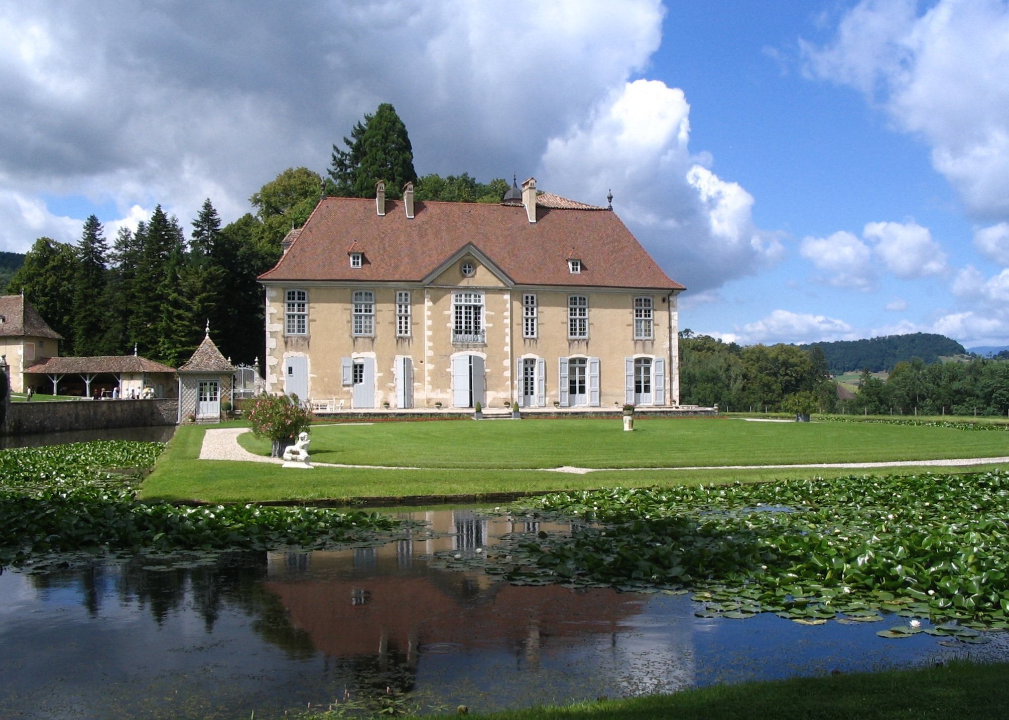 Château de Longpra